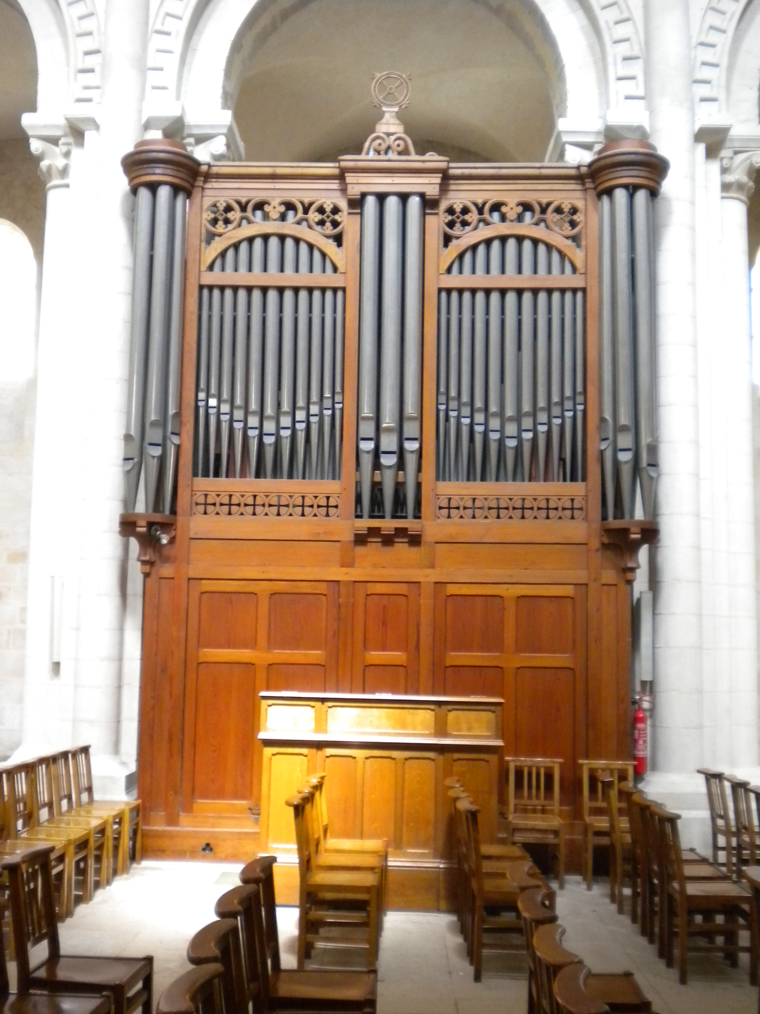 Abbaye aux Dames à Caen (Calvados), orgue de chœur .